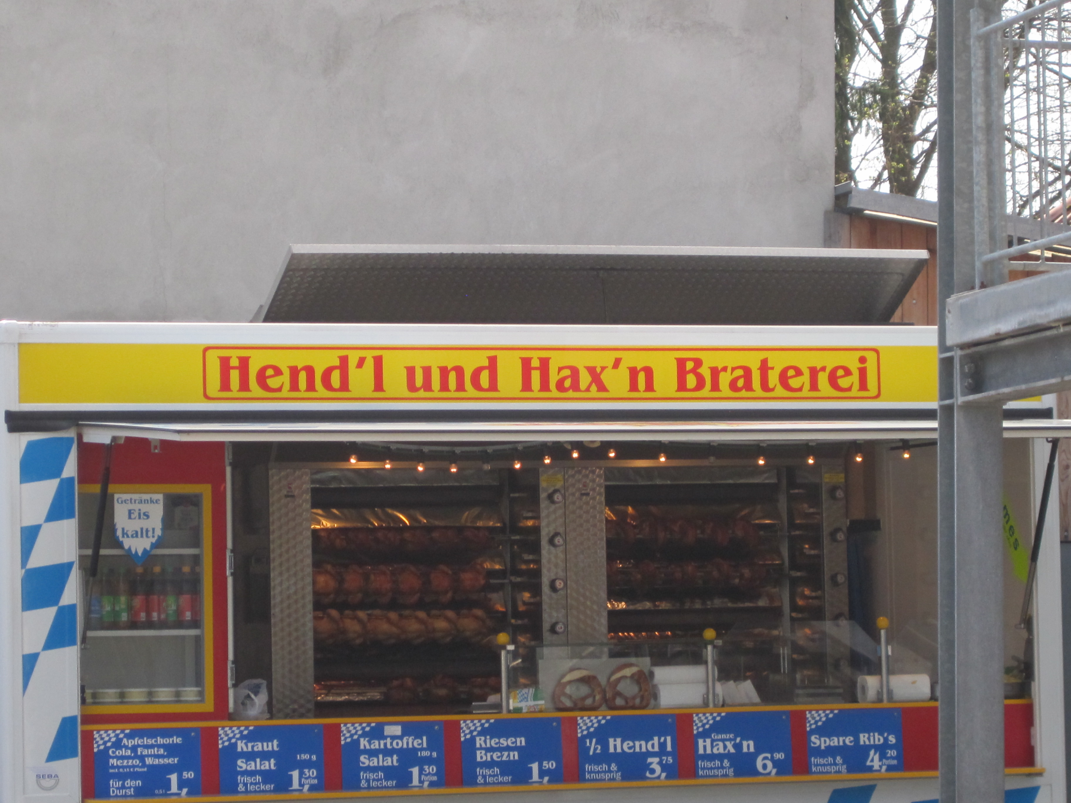 Fehlersuchbild001 für Benutzer Deppenmagnets Sammlung